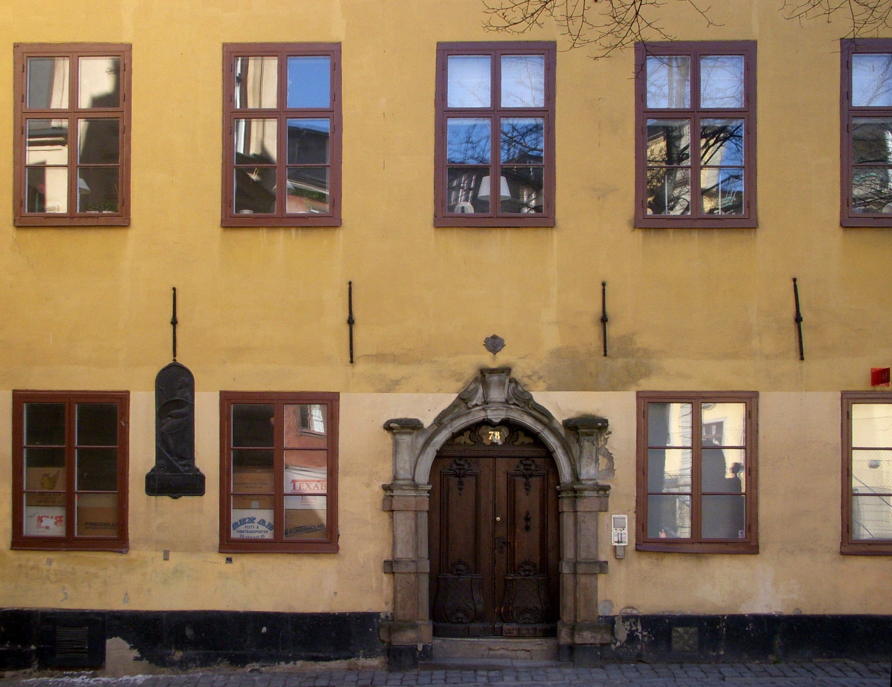 Prästgatan 78 i Gamla stan, Carl Larssons födelsehus